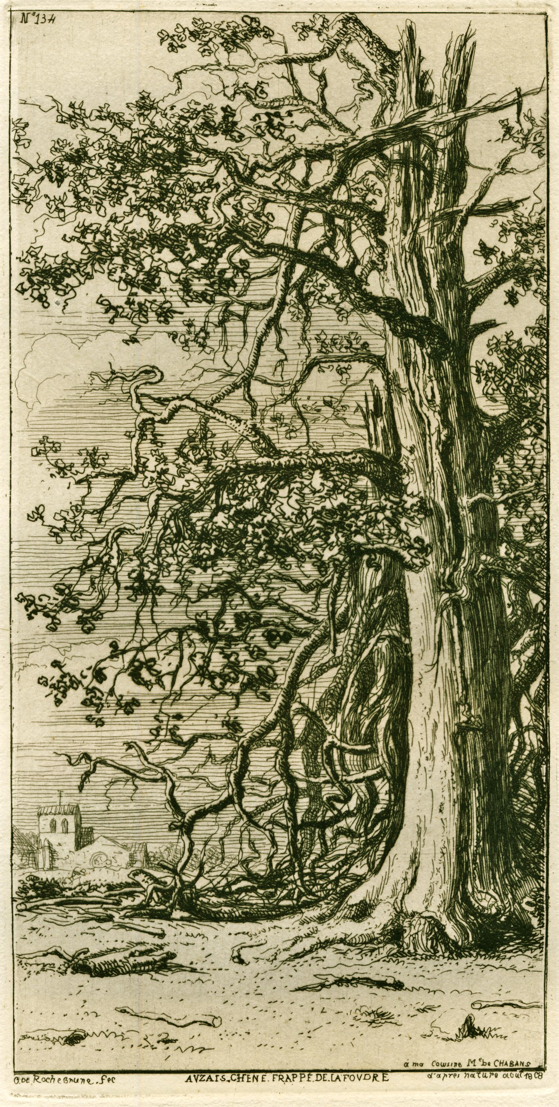 Gravure d'Octave de Rochebrune, Auzais (ex-région Poitou-Charentes), "Chêne frappé par la foudre" 1868. Eau-forte sur cuivre.